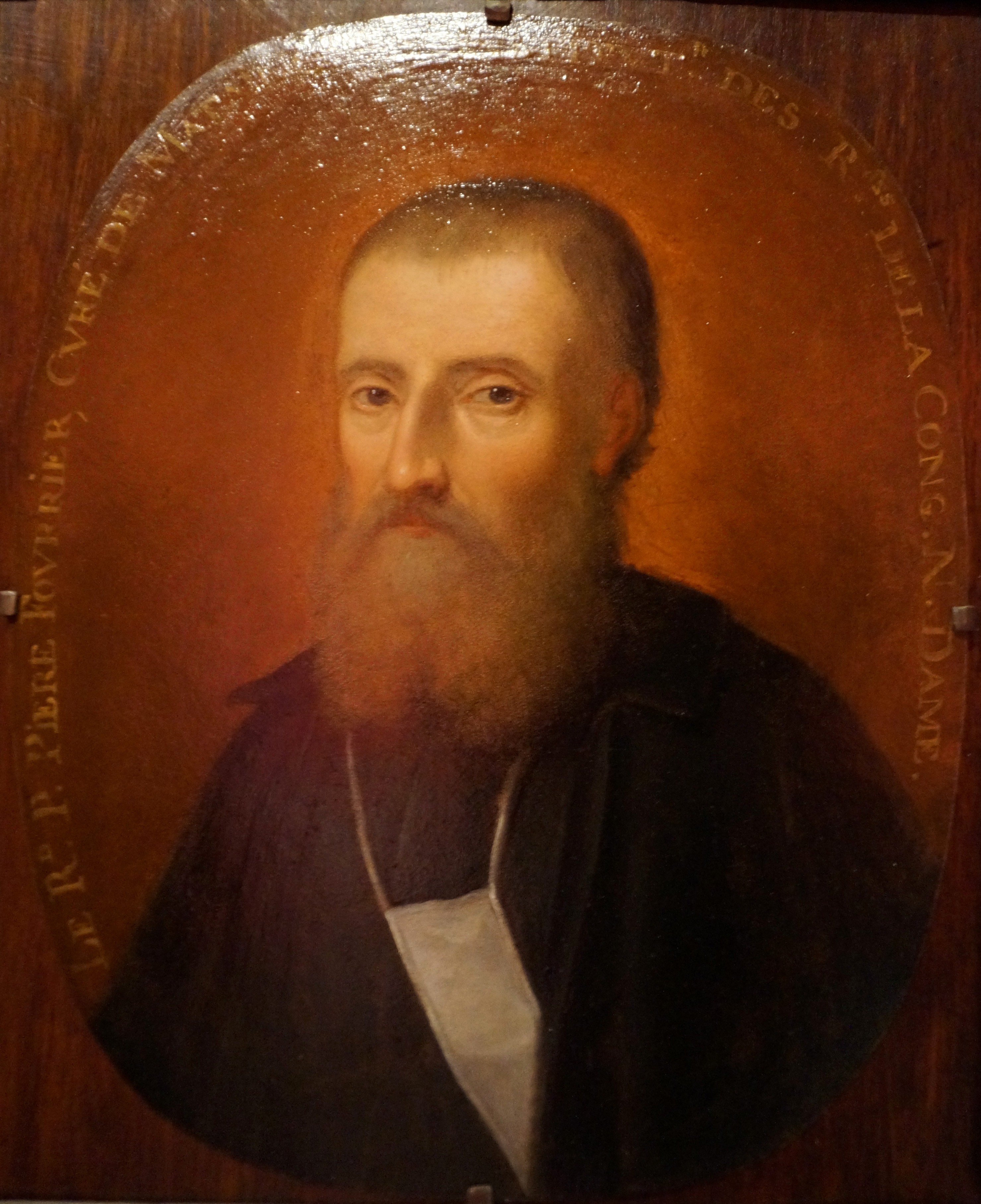 Présenté au Musée Lorrain. Huile sur cuivre.